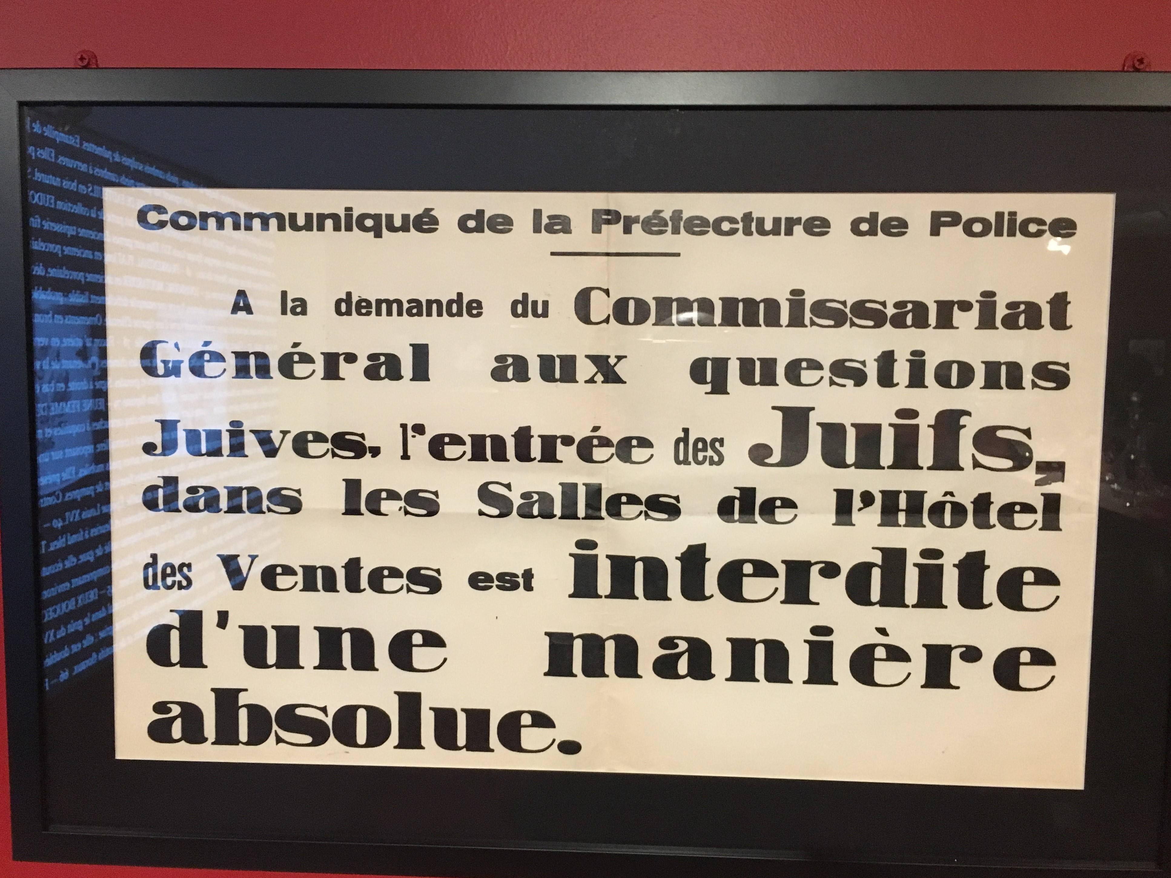 Affiche apposée à l'entrée de l'hôtel Drouot à Paris sous l'occupation allemande. L'hôtel Drouot était l'hôtel de ventes où ont été vendus de nombreux biens juifs spoliés.